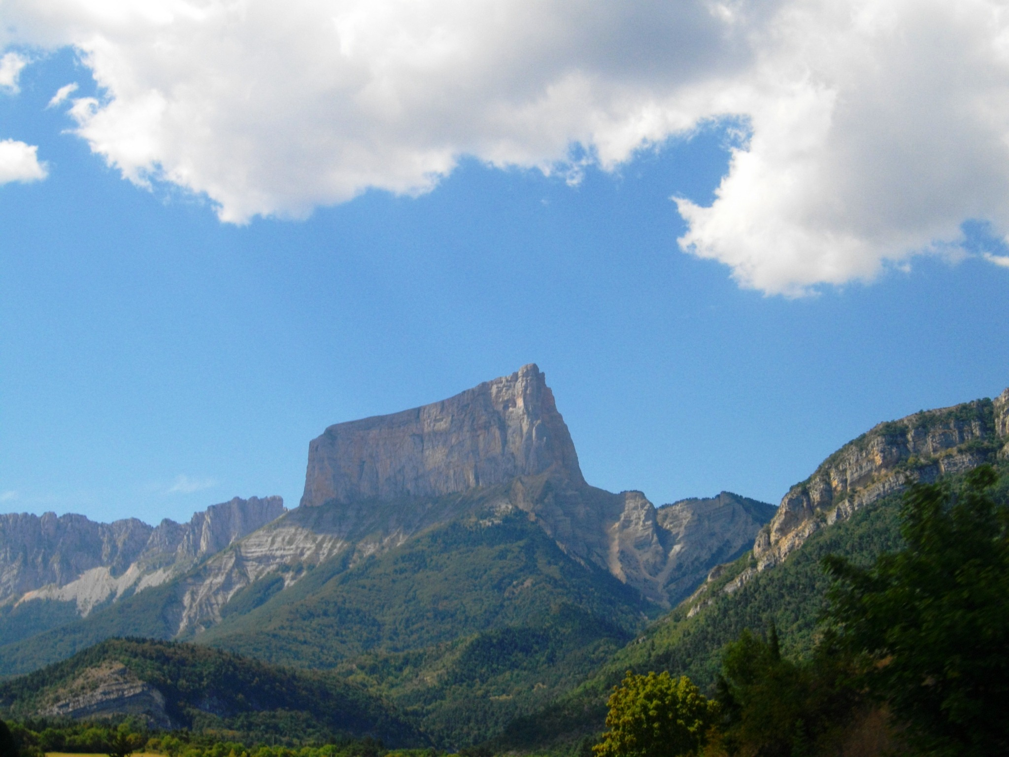 Le Mont Aiguille et la Forêt Domaniale de Chichilianne